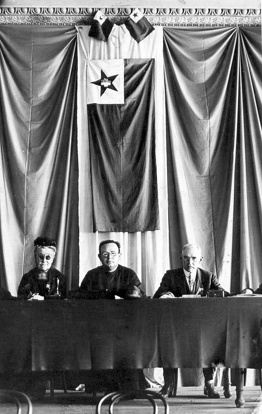 La estraro de IKUE dum la 14a Internacia Katolika Esperanto-Kongreso en Prago, 1929. De maldekstre: Marie Larroche, Joan Font i Giralt, Paulus Antonius Schendeler.